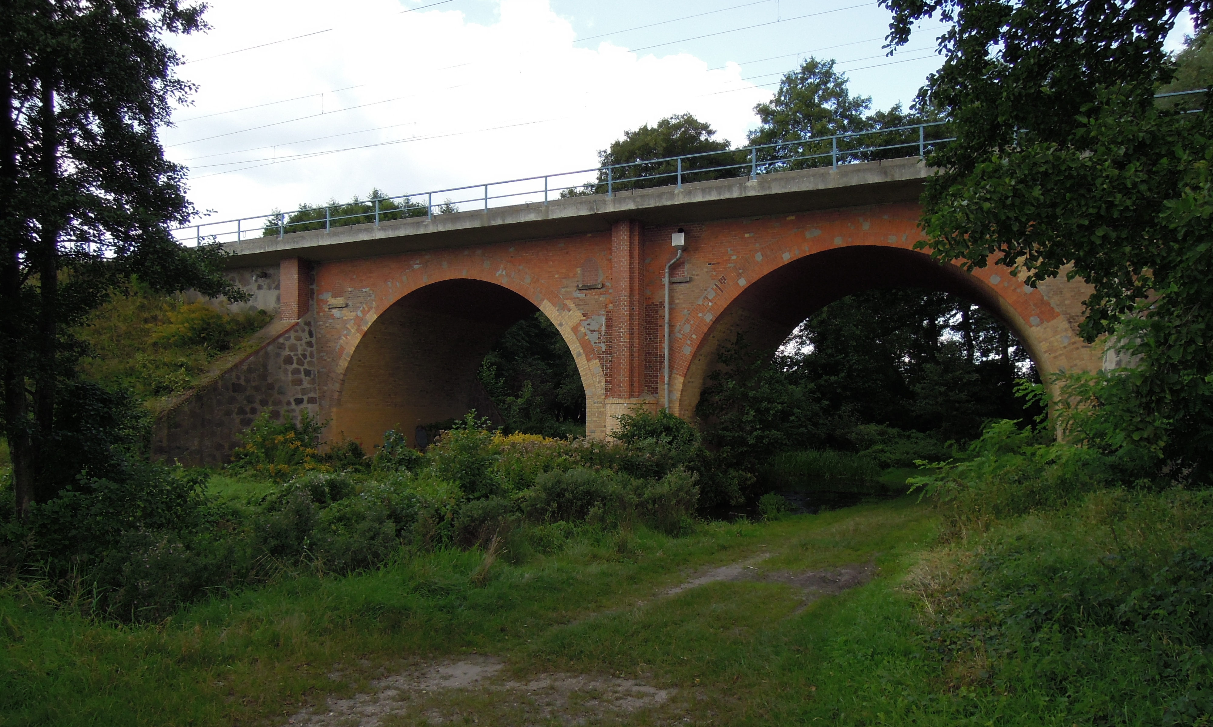 Eisenbahnbrücke über die Zahna der Bahnstrecke Berlin–Halle -Anhalterbahn- in Zahna-Elster. Es handelt sich um eine zweibogige Brücke aus Ziegelsteinen.